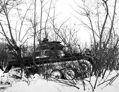 tenk Panzer I Hrvatskog domobranstva NDH